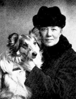 Anna Munthe-Norstedt (1854-1936), svensk konstnär, porträttmålare och stillebenmålare.